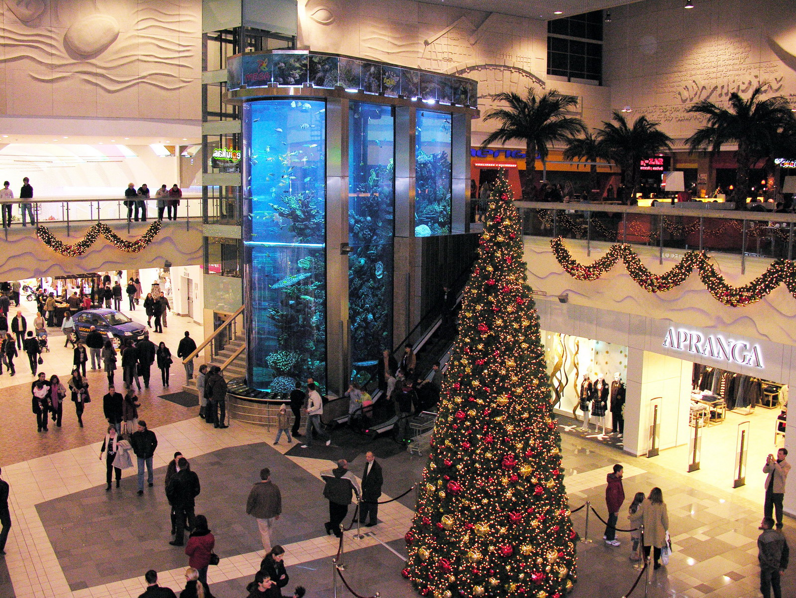 Žemaitėška: Mega akvariumas Kaune